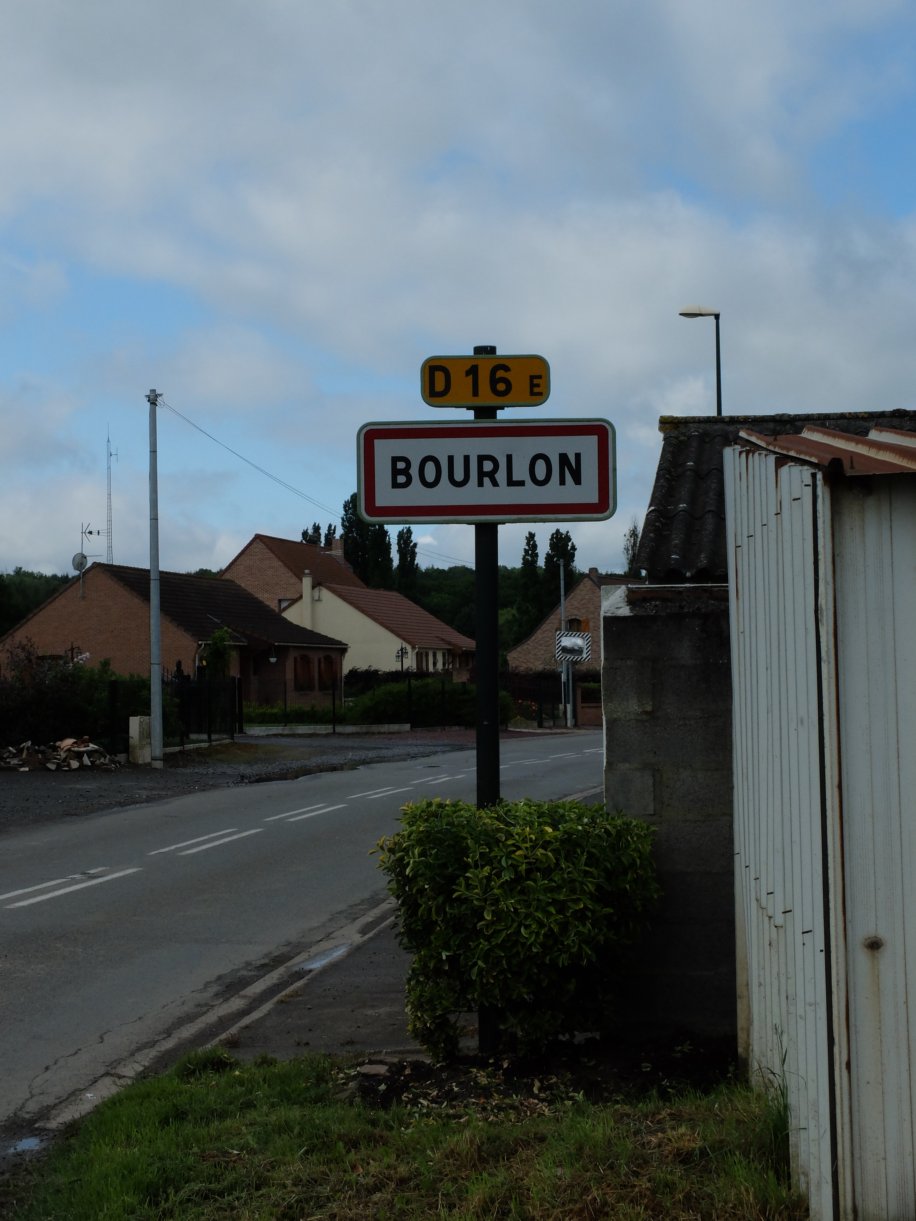 Vue d'une entrée de la commune de Bourlon.